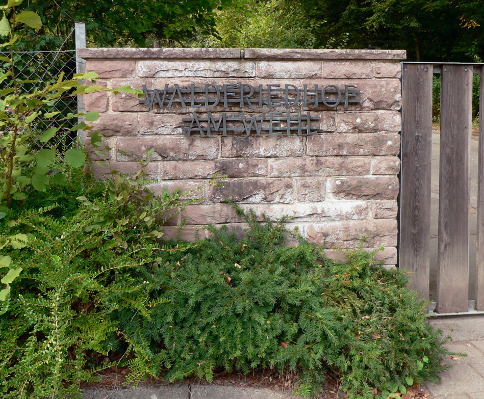 Schriftzug am Haupttor des Friedhof Am Wehl